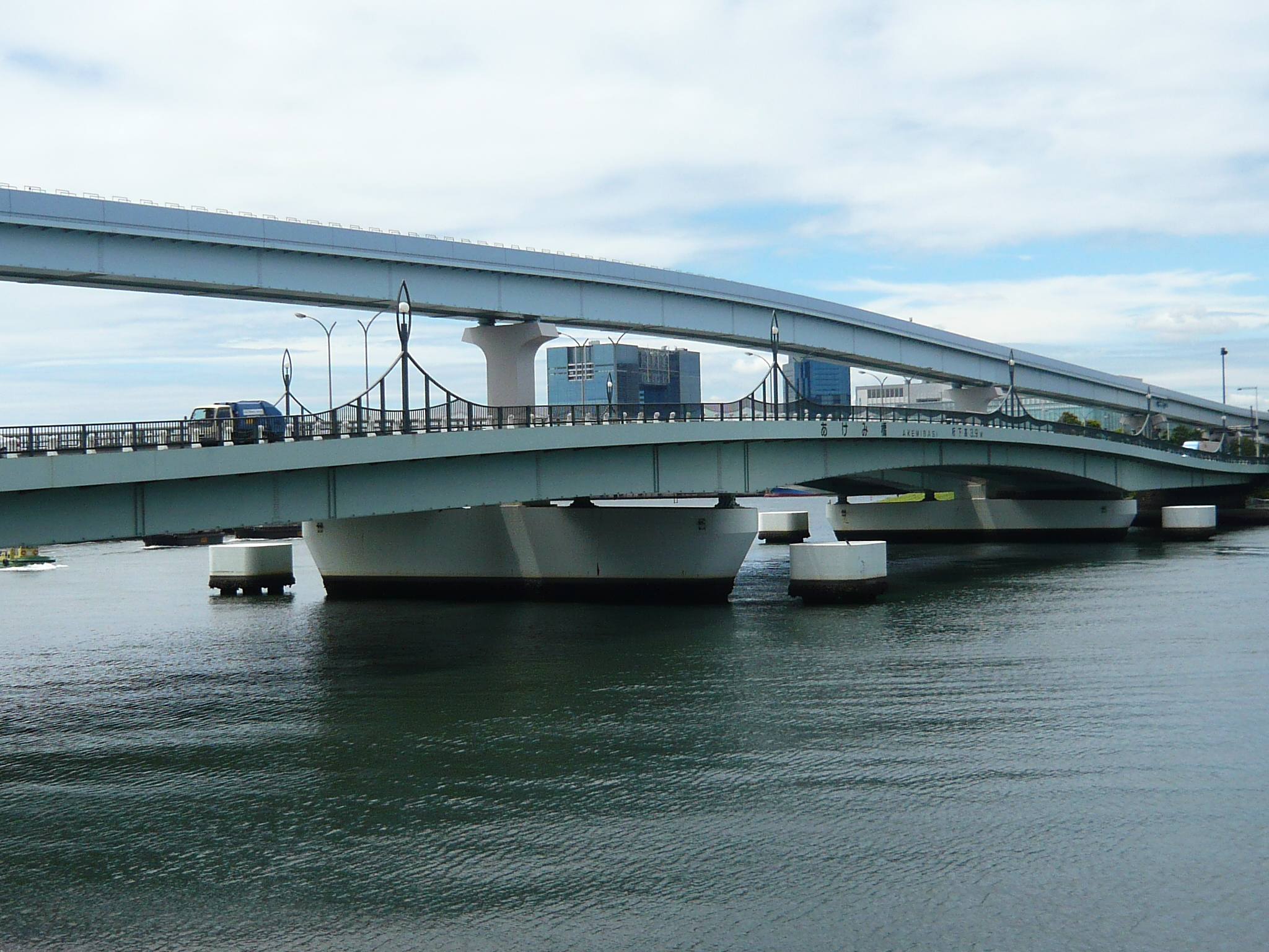 東京都江東区青海と有明の間に架かるあけみ橋 Akemi-bashi(Akemi bridge、あけみ橋) in Koto-ku,Tokyo,Japan.